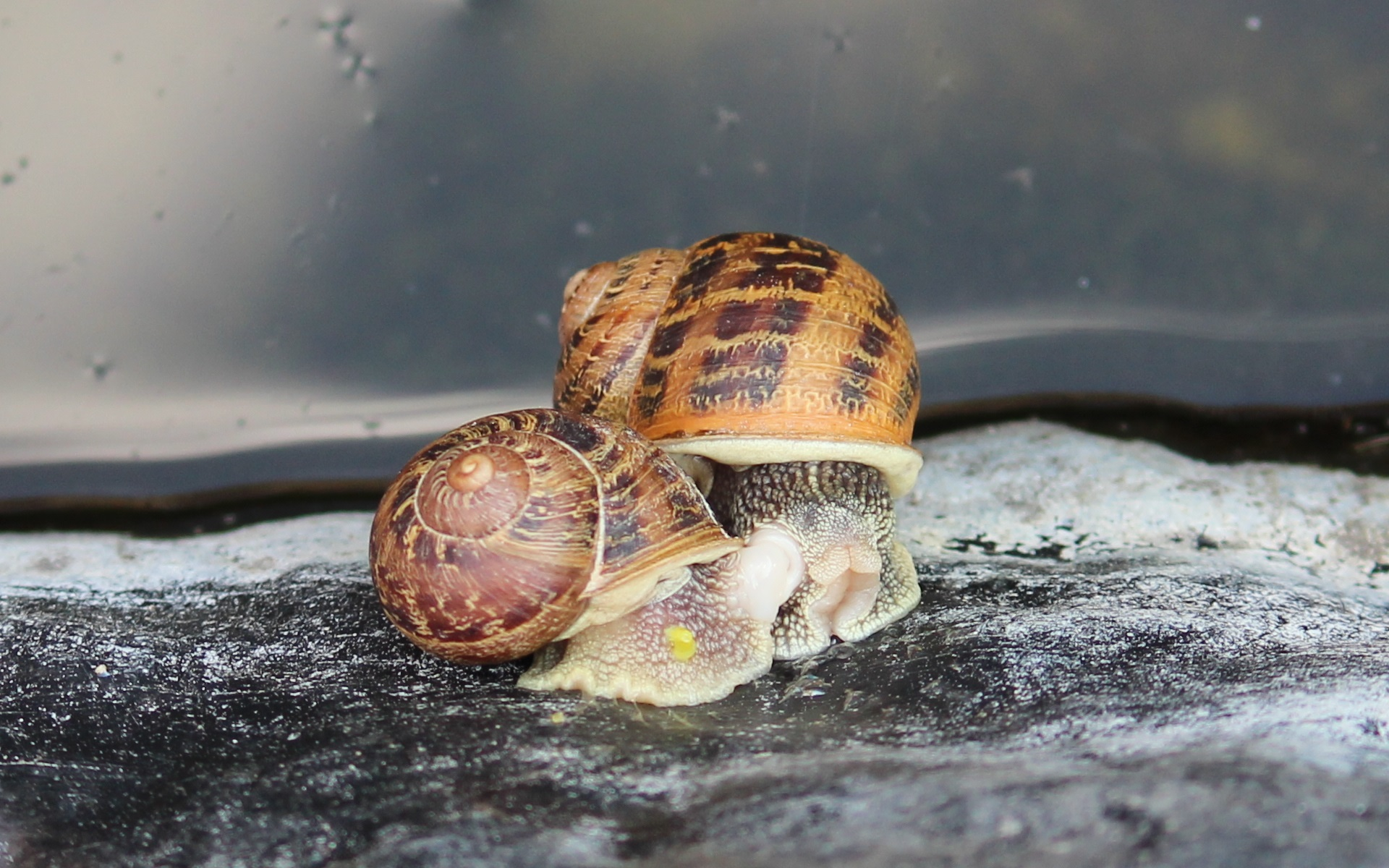 Helix aspersa